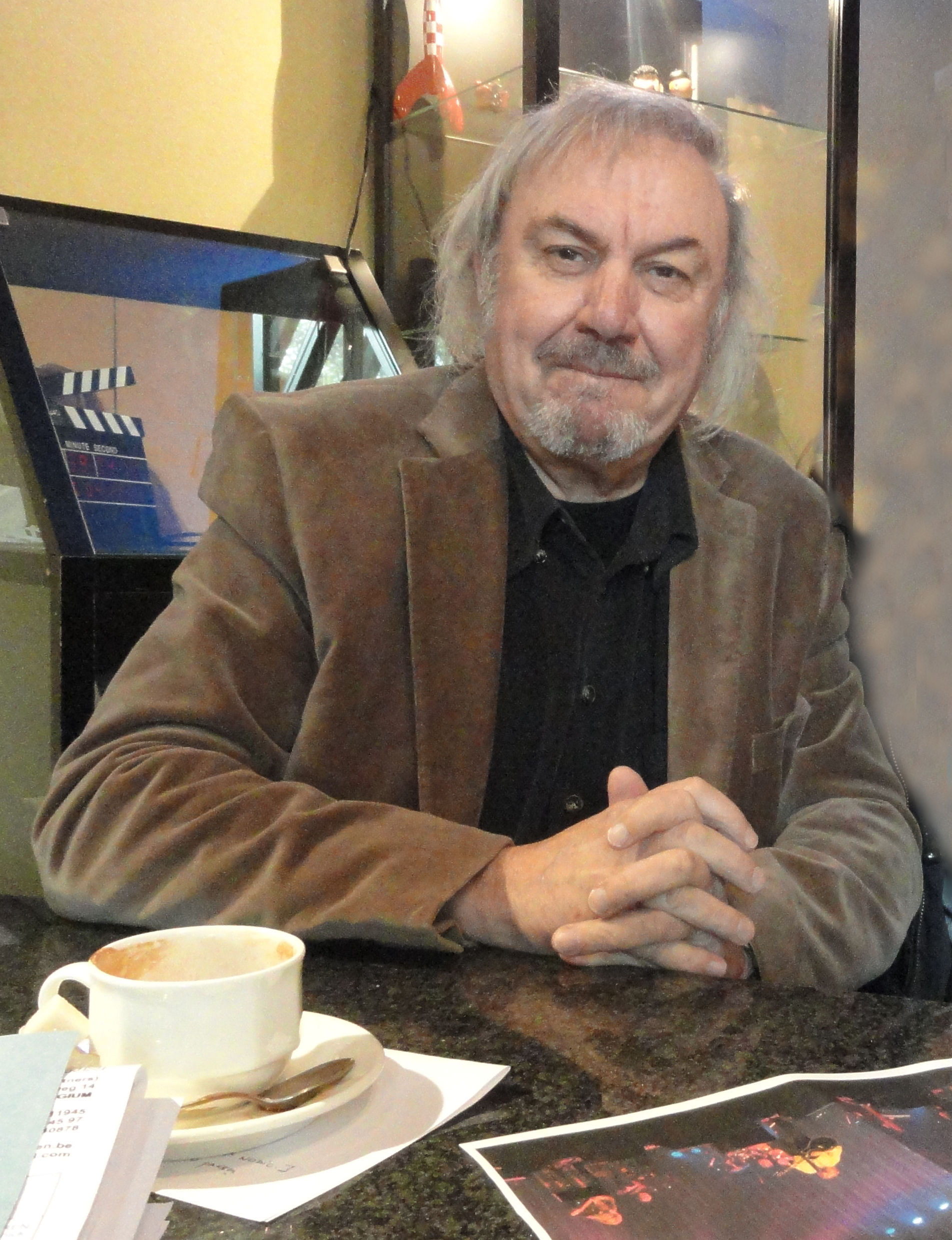 Zjef Vanuytsel op 6 april 2011